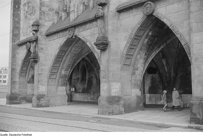 Original image description from the Deutsche FotothekAnsicht der Stadtkirche St. Jakobi in Chemnitz